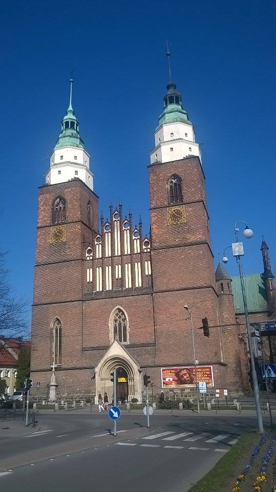 Hlavní vstup kostela Panny Marie v Hlubčicích